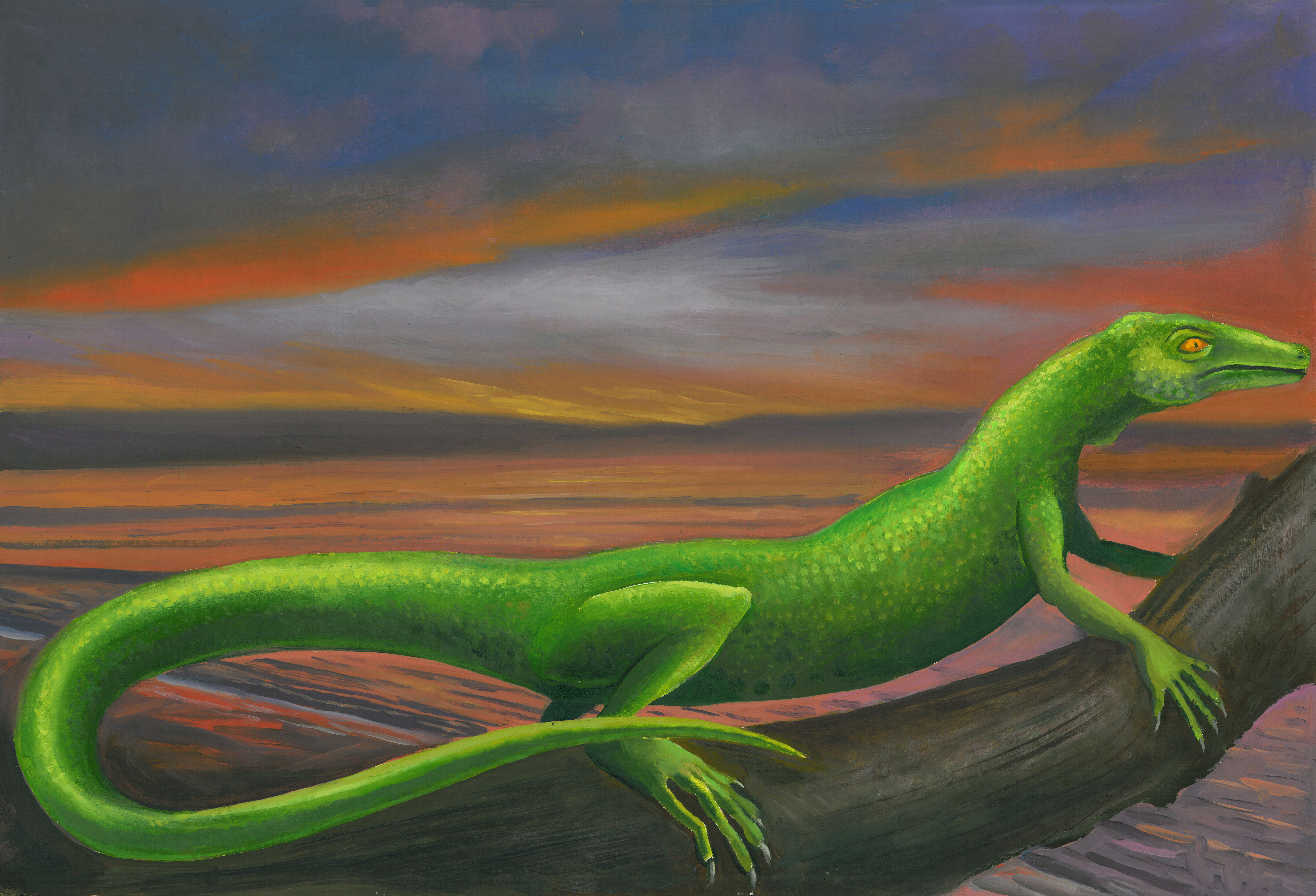 Il·lustració científica que recrea l'aparença de l'extingit Tadeosaure a partir de la informació disponible. La il·lustració s'ha realitzat amb l'assessorament d'Alistair Ian Spearing Ortiz, traductor científic i actiu participant del Viquiprojecte:Mamífers.